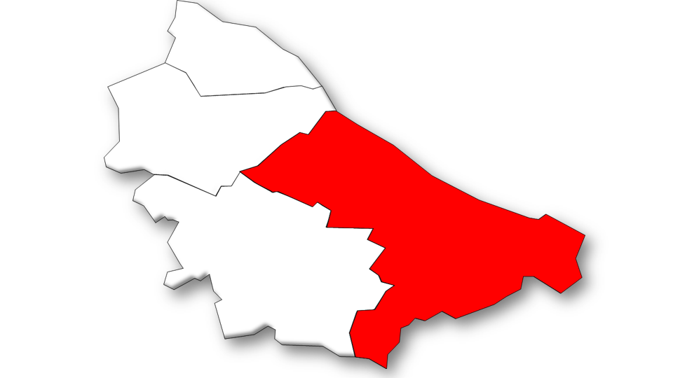 Evolução da População